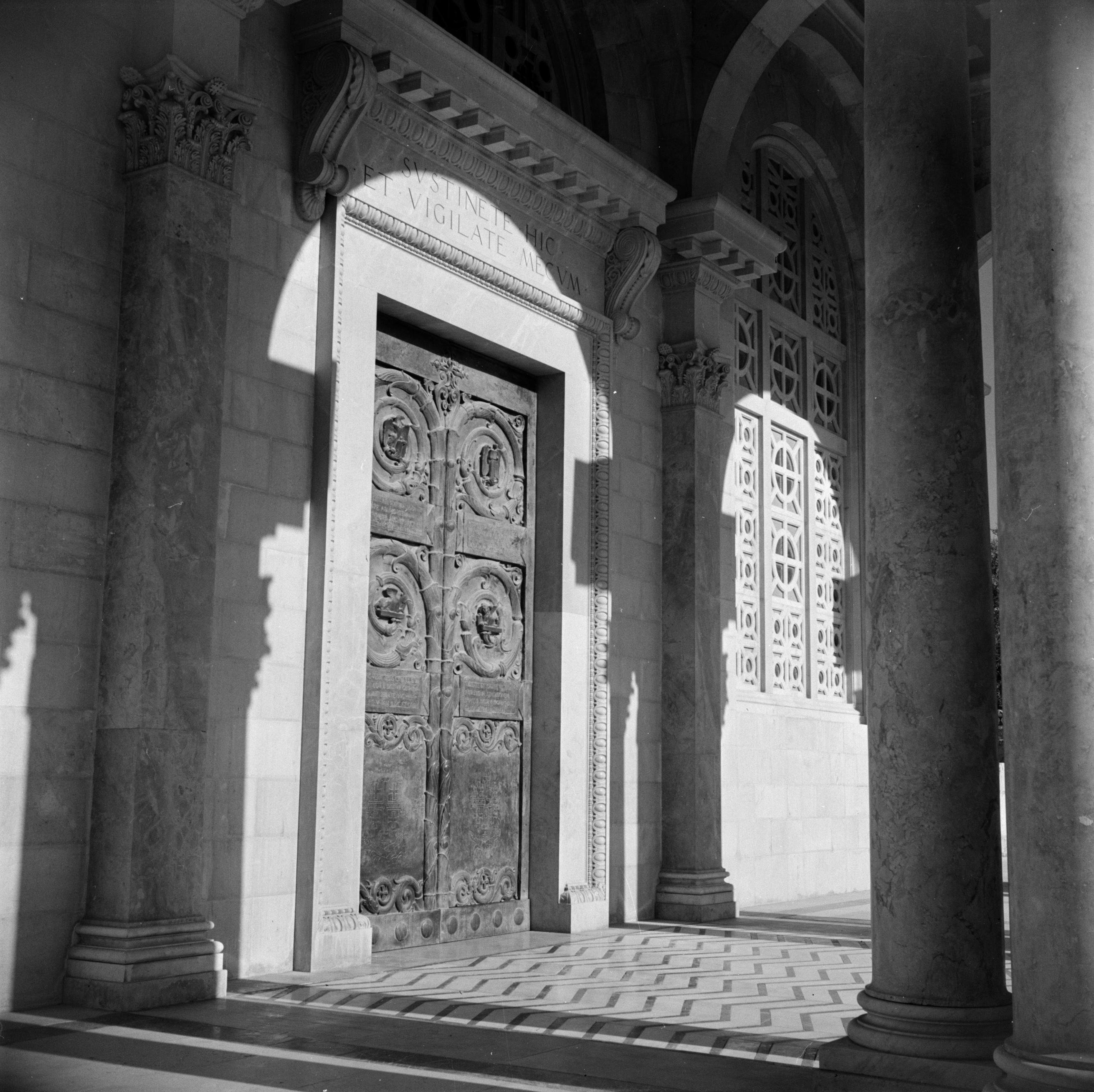 Collectie / Archief : Fotocollectie Van de Poll Reportage / Serie : Midden-Oosten 1950-1955: Jeruzalem Beschrijving : Deur en portaal van de Church of the agony (Kerk van het heilige lijden) ook wel bekend als Church of all nations (Kerk van alle volken) tegenover de Hof van Gethsemane Annotatie : Ten tijde van de opname lag Jeruzalem in Jordanië Datum : 1950 Locatie : Jeruzalem, Jordanië Trefwoorden : deuren, kerken Fotograaf : Poll, Willem van de Auteursrechthebbende : Nationaal Archief Materiaalsoort : Negatief (zwart/wit) Nummer archiefinventaris : bekijk toegang 2.24.14.02 Bestanddeelnummer : 255-5328